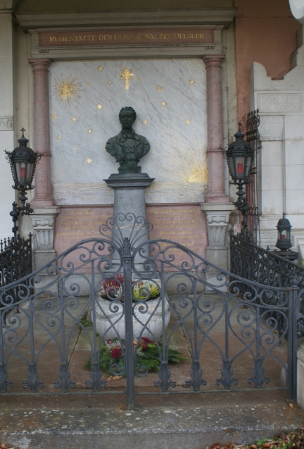 Friedhof Weissenbach an der Triesting-Camillo Walzel